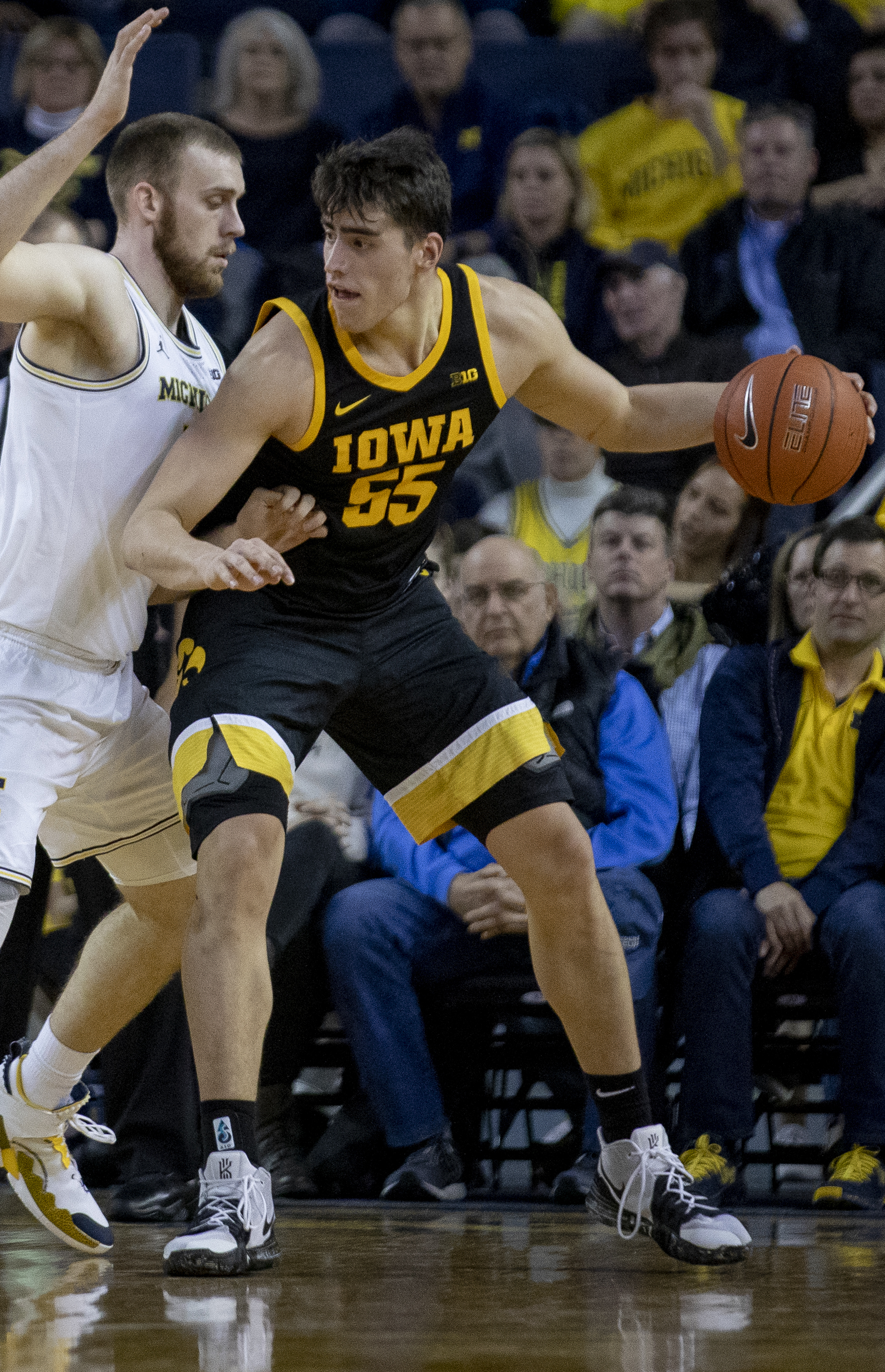 _O6A2440